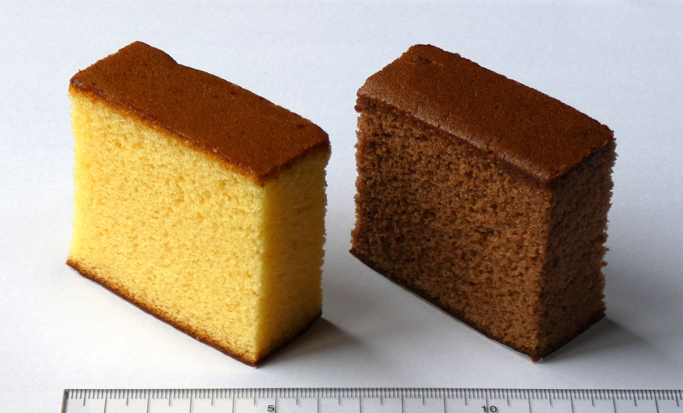 文明堂 おやつカステラ（右はチョコレート味）